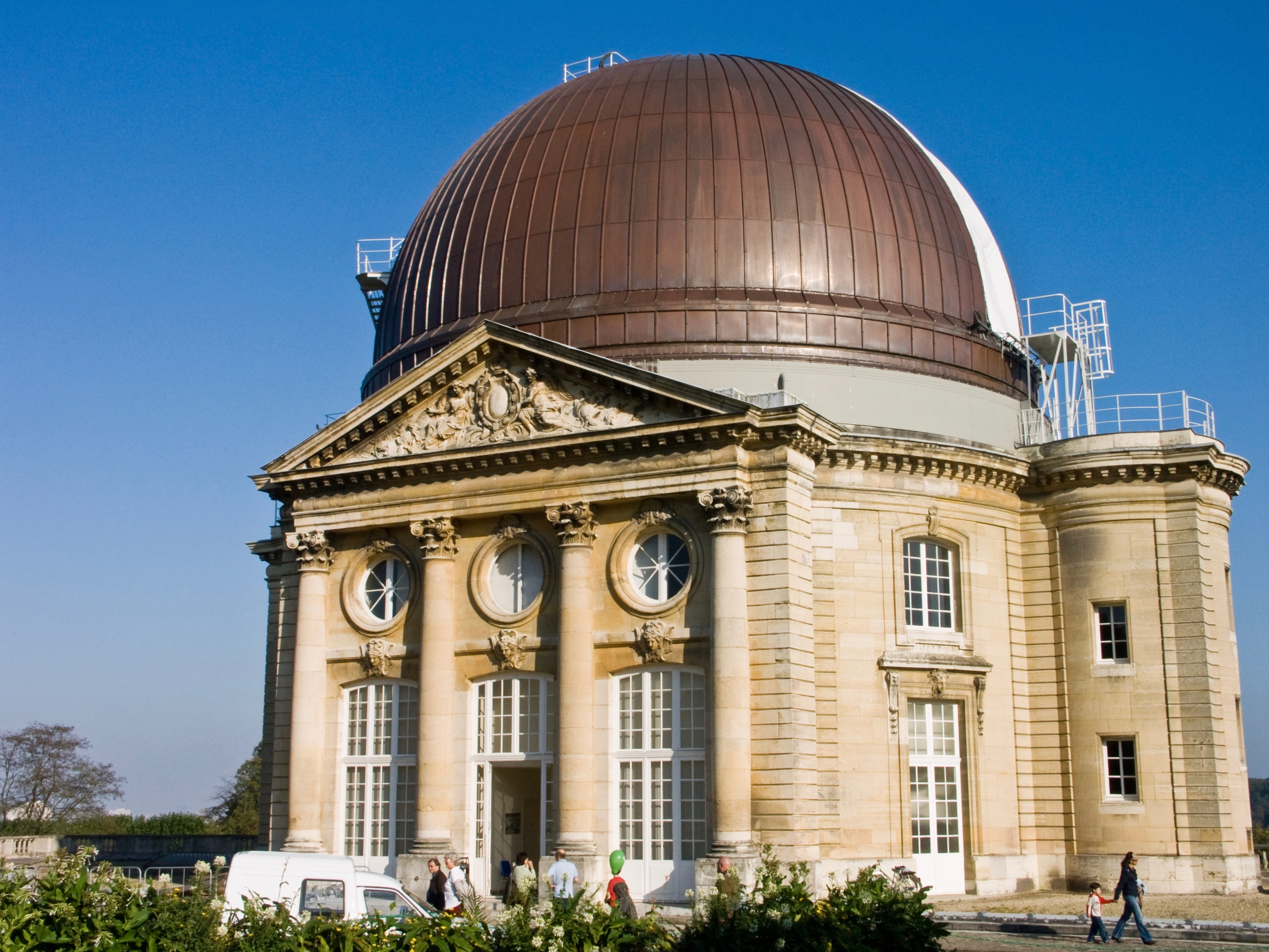 La Grande Coupole de l'Observatoire de Meudon (abritant la Grande Lunette)